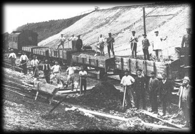 Bauarbeiten bei Dittelsheim-Heßloch an der Bahnstrecke Osthofen–Gau-Odernheim